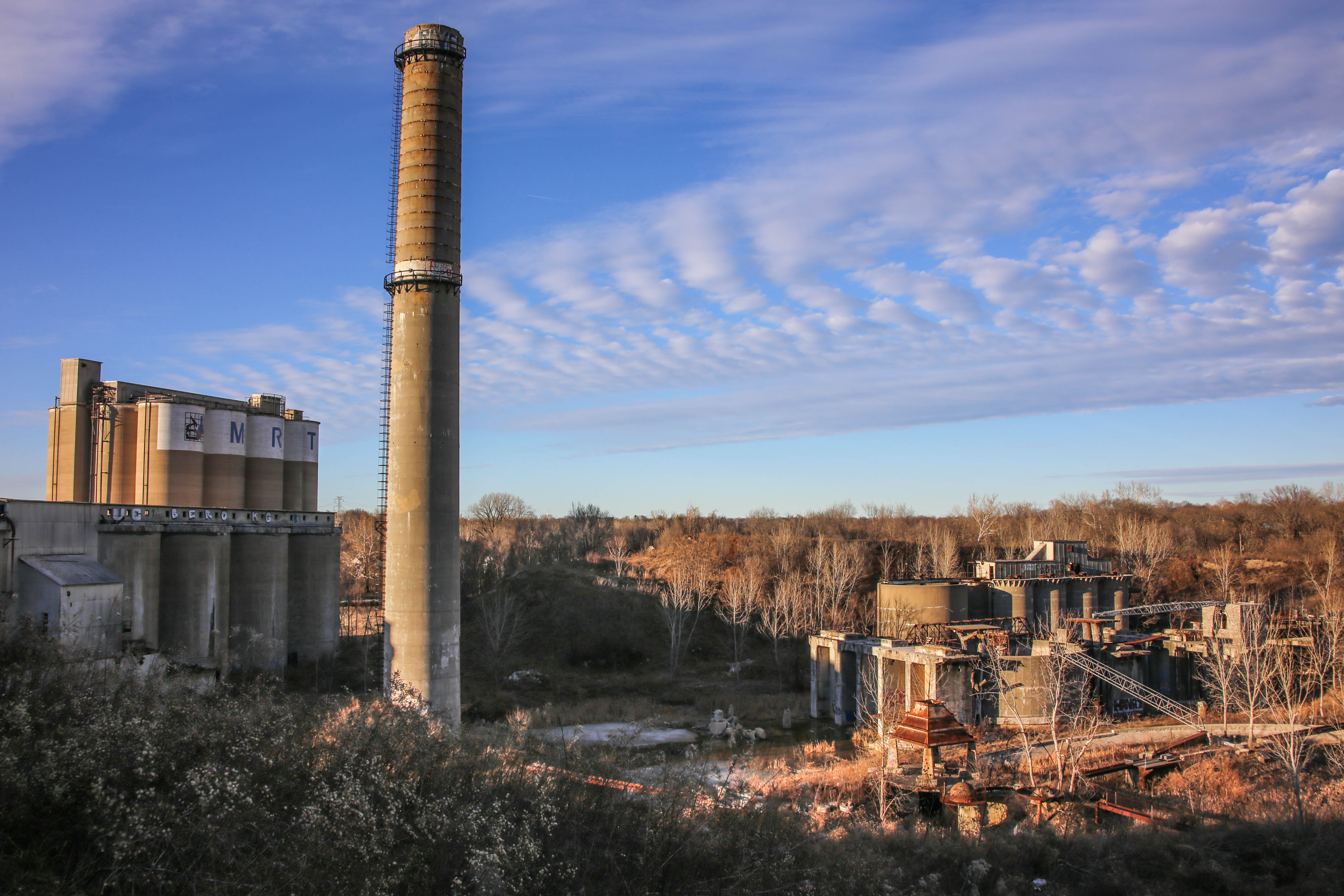 Cementland in 2015